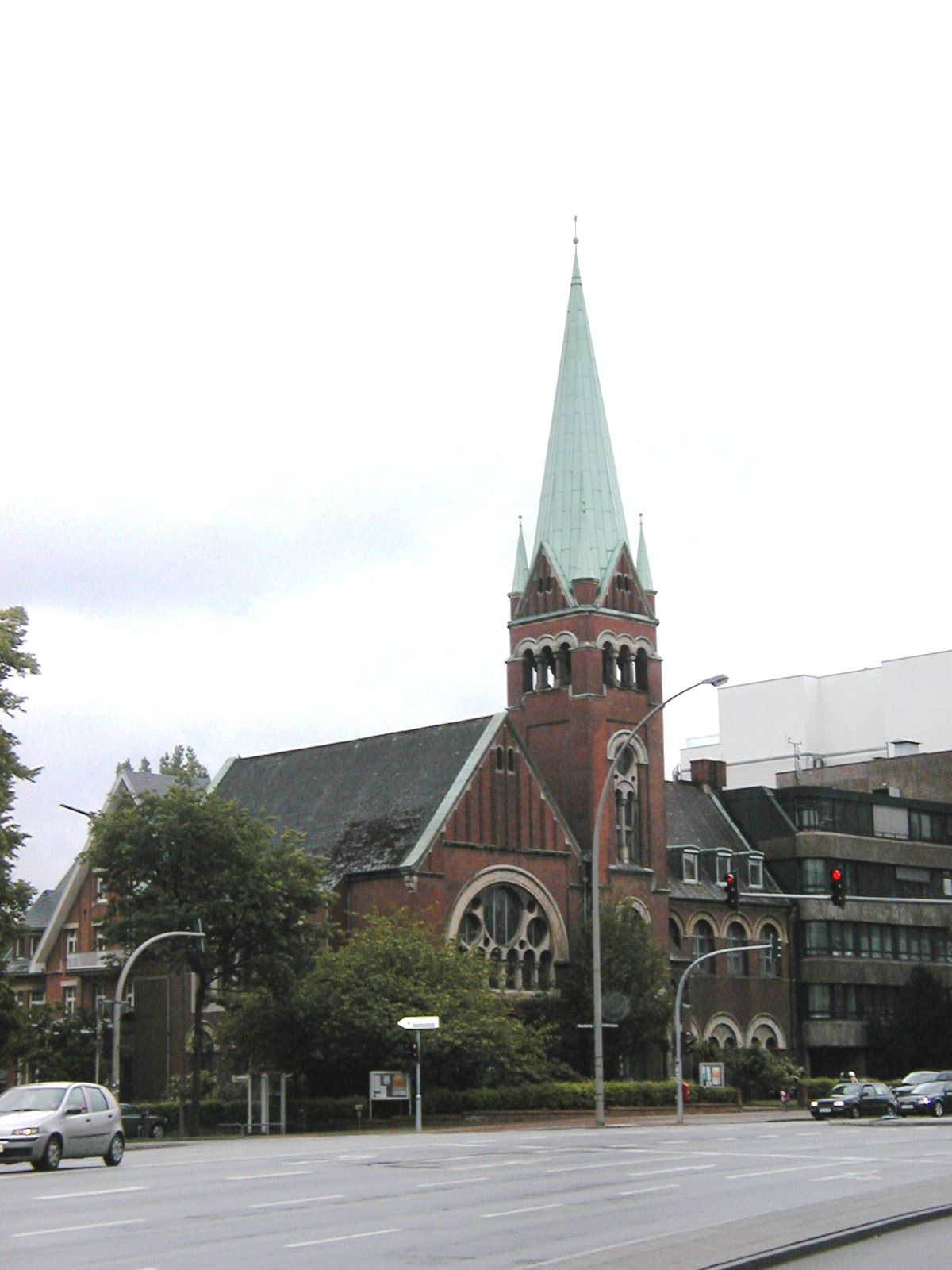 Hamburg-Eimsbüttel, Jerusalemkirche mit Krankenhaus, schäferkampsallee Ecke Moorweide